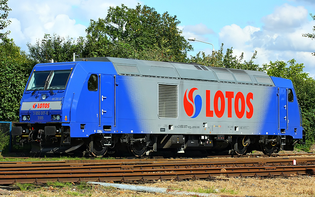 LOTOS Kolej Bombardier TRAXX F140 DE @ Brodnica